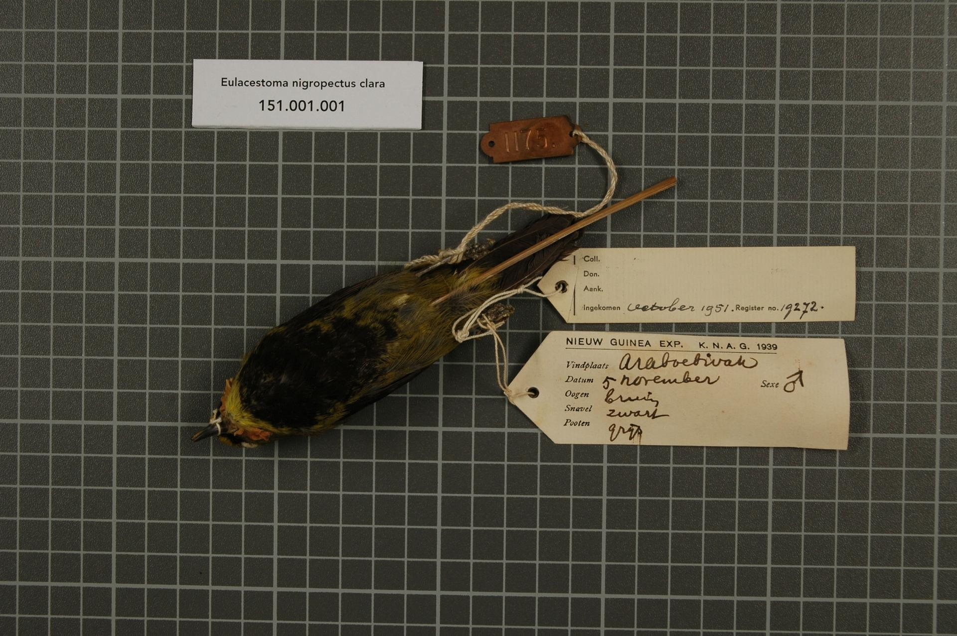 Eulacestoma nigropectus clara Stresemann and Paludan, 1934